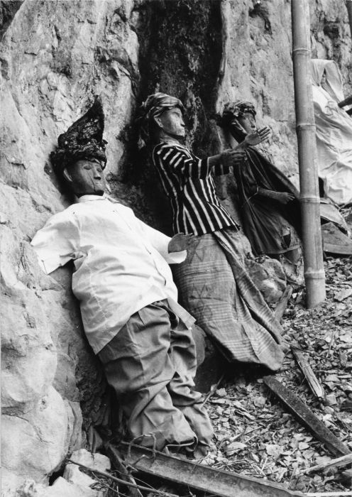 Negatief. De tau-tau is een pop die de overledene voorstelt.. Verschillende tau-tau van een overleden vorst